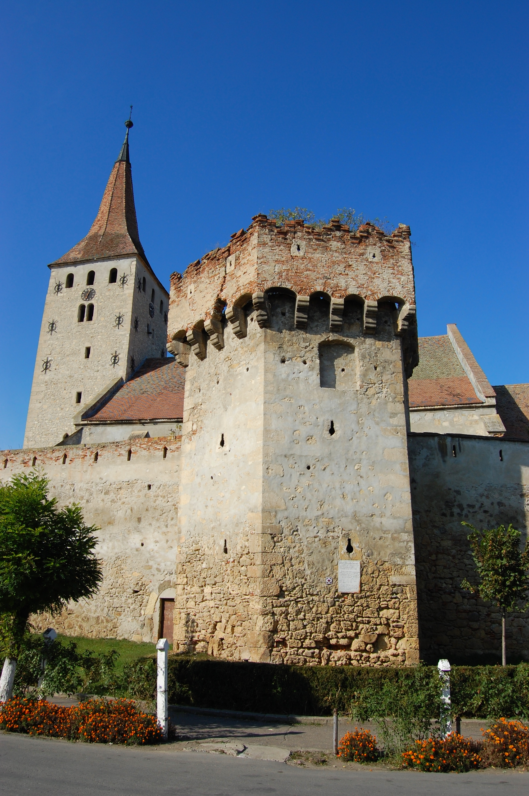 Nagyenyed - vár - a déli bástya ( szűcs bástya ) és a Református vártemplom